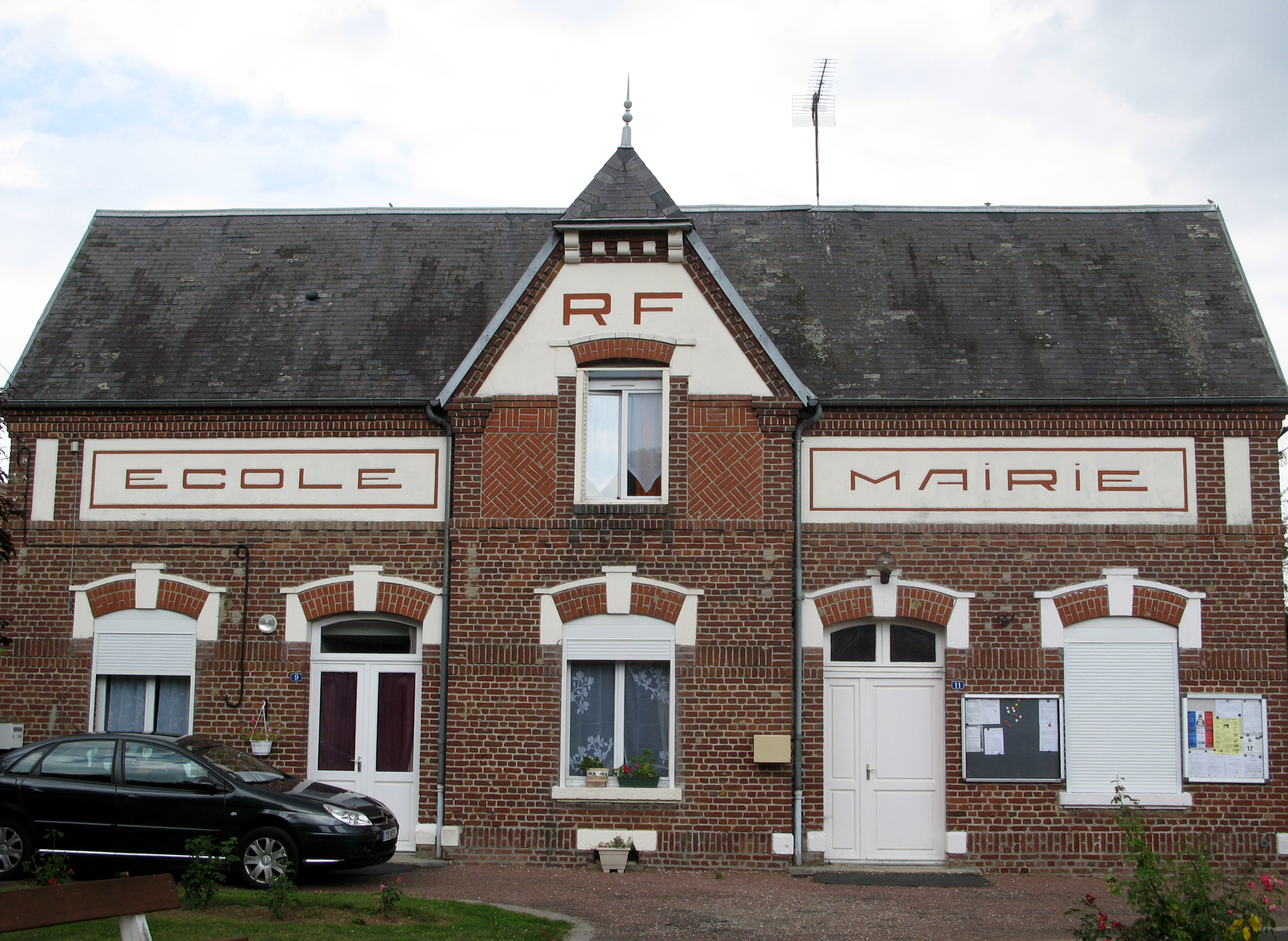 Maucourt (Somme, France) - La mairie. . .